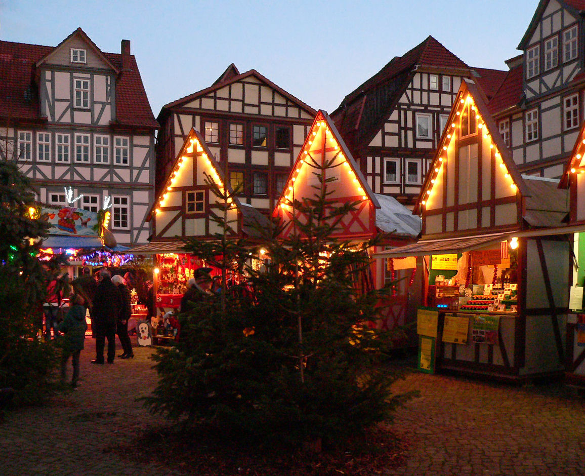 Weihnachtsmarkt Hann. Münden